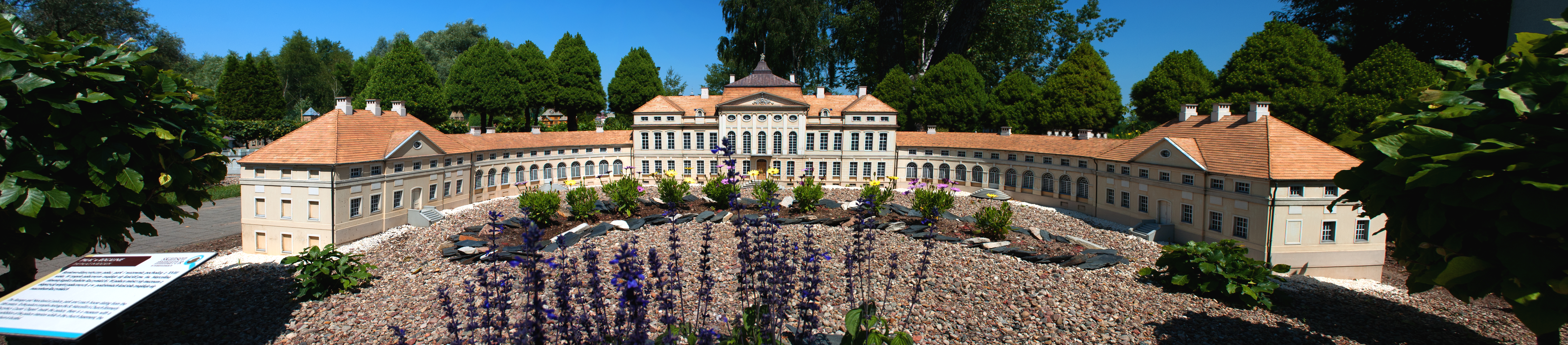 Panorama Pałacu w Rogalinie znajdującego się w Skansenie Miniatur w Pobiedziskach